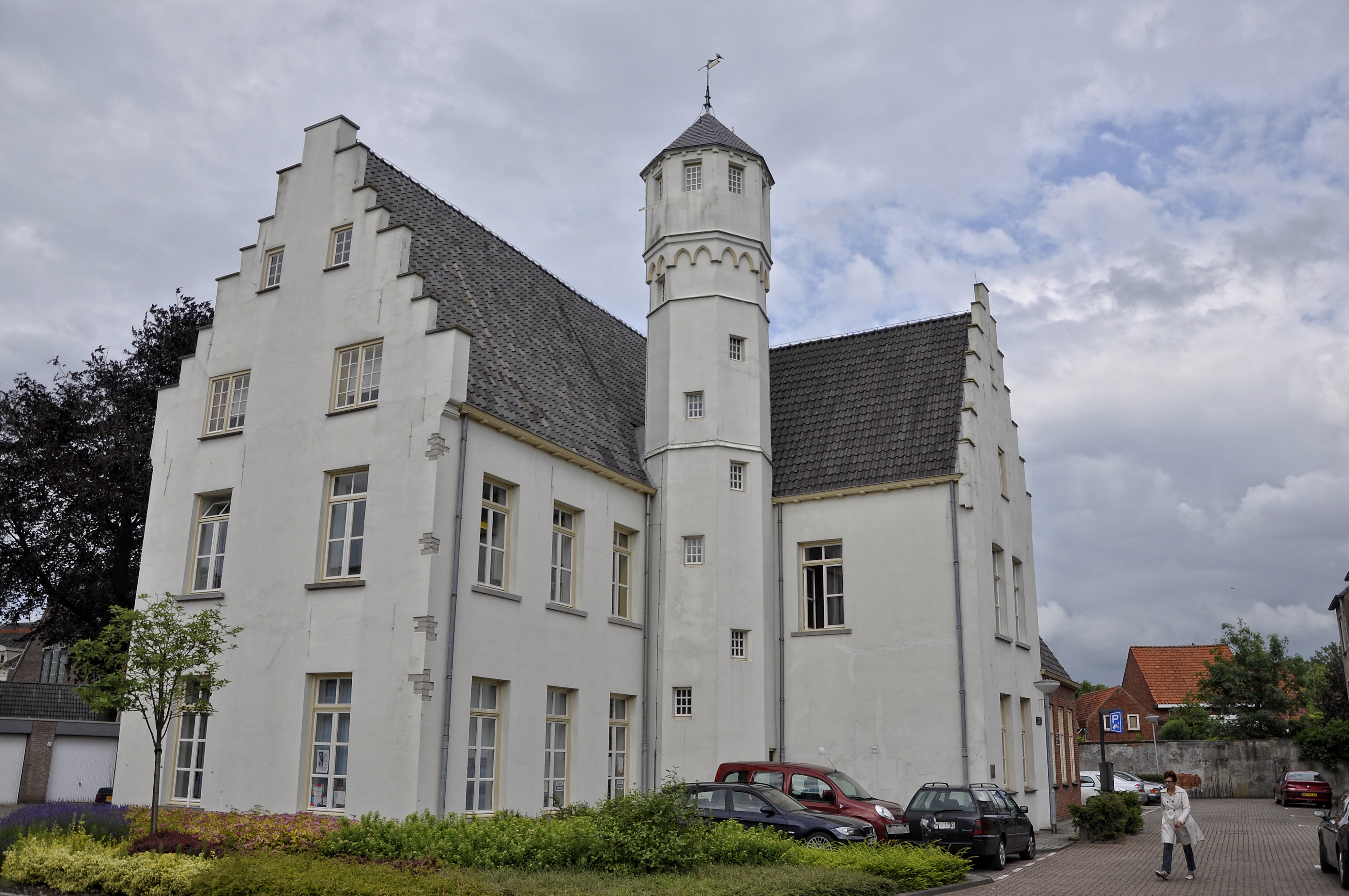 Het refugium (refugiehuis) van Baudeloo (Boudelo - Baudelo) in Hulst, Nederland